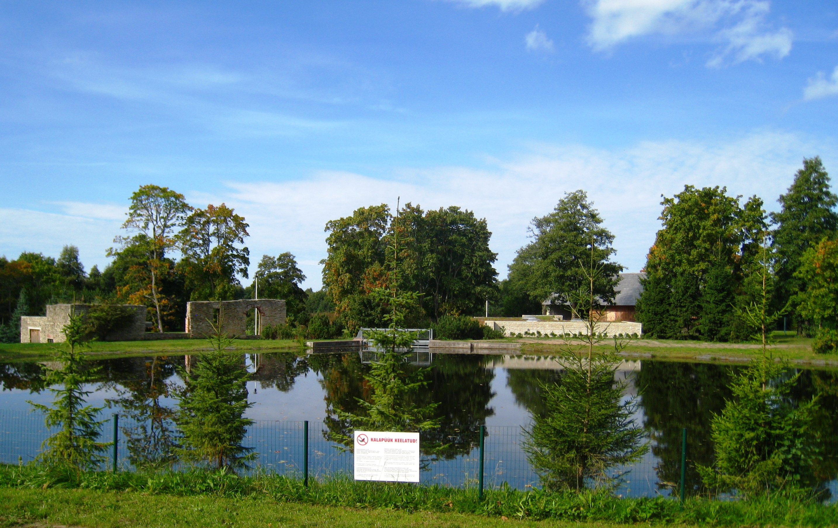 Loo mõisa paisjärv. Soorinna küla.